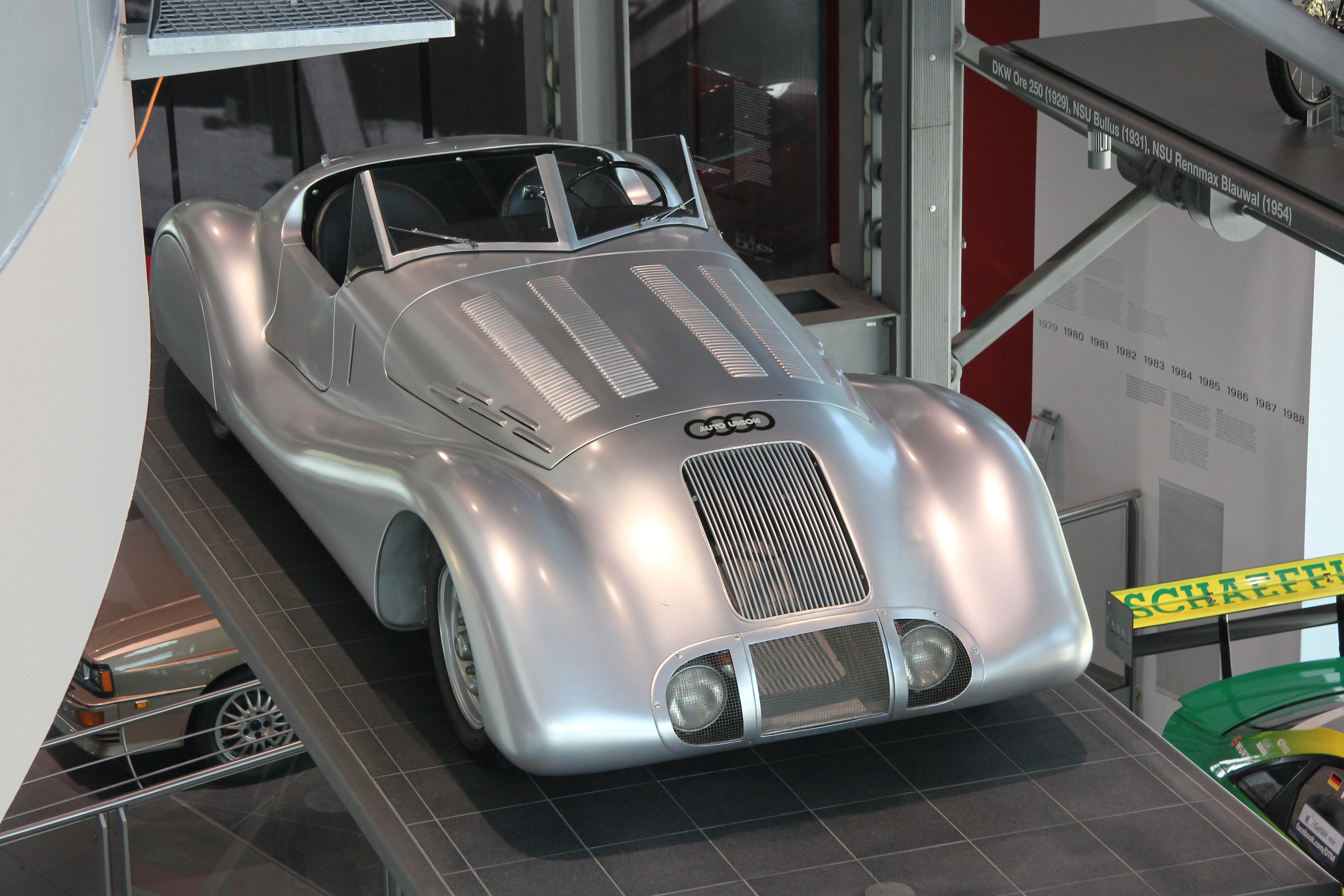 Wanderer Stromlinie Spezial aus den Jahren 1938/39, Nachbau von 2003